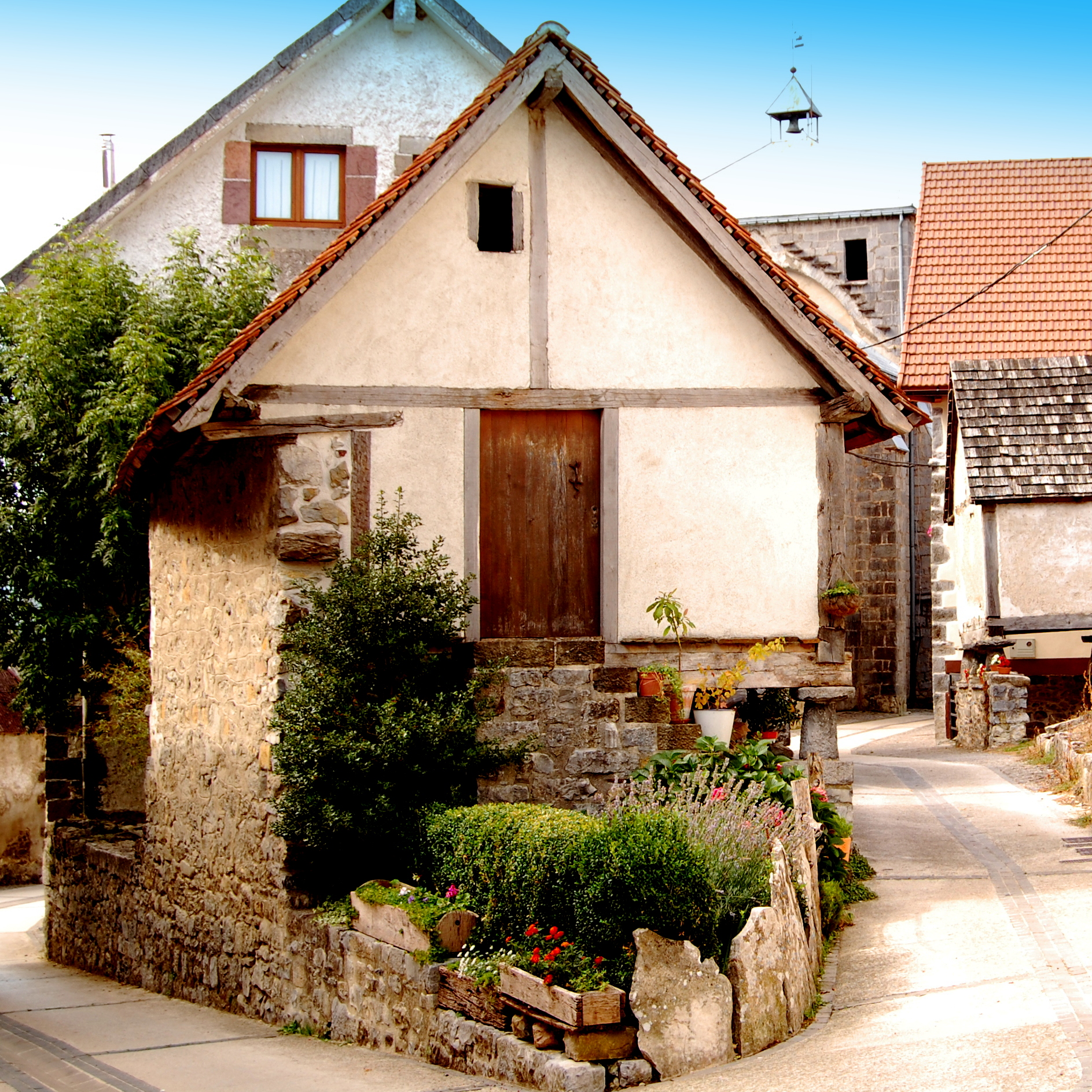 Hórreo Casa Estanquero Orbaizeta ( Navarra ) C.F. Navarra (R.I.) - 51 - 0008233 - 00000